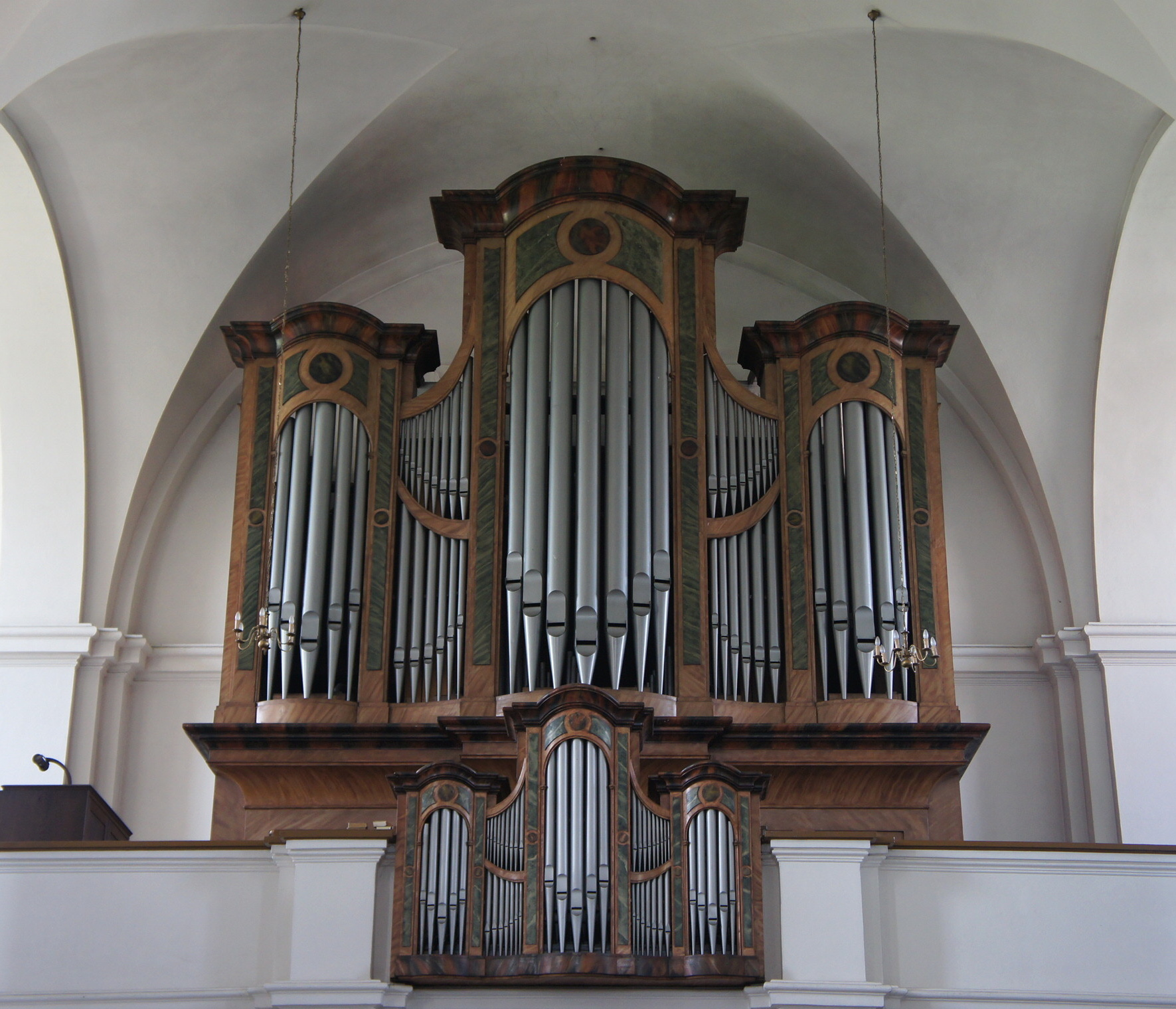 Katholische Wallfahrtskirche Rosenthal. Vorgängerkapelle wurde 1600 erbaut, die dreischiffige Hallenkirche stammt aus dem Jahr 1778. Abgebrannt am 1. Mai 1945 bis auf die Mauern und das Deckengewölbe, dabei konnte das Gnadenbild gerettet werden. 1947 wieder eingeweiht, Außenerneuerung 1979/80, Innenerneuerung 1987. Orgel erbaut 1949 durch Jehmlich Orgelbau Dresden, 1995 generalüberholt durch Josef Poukar und Jan Eliáš